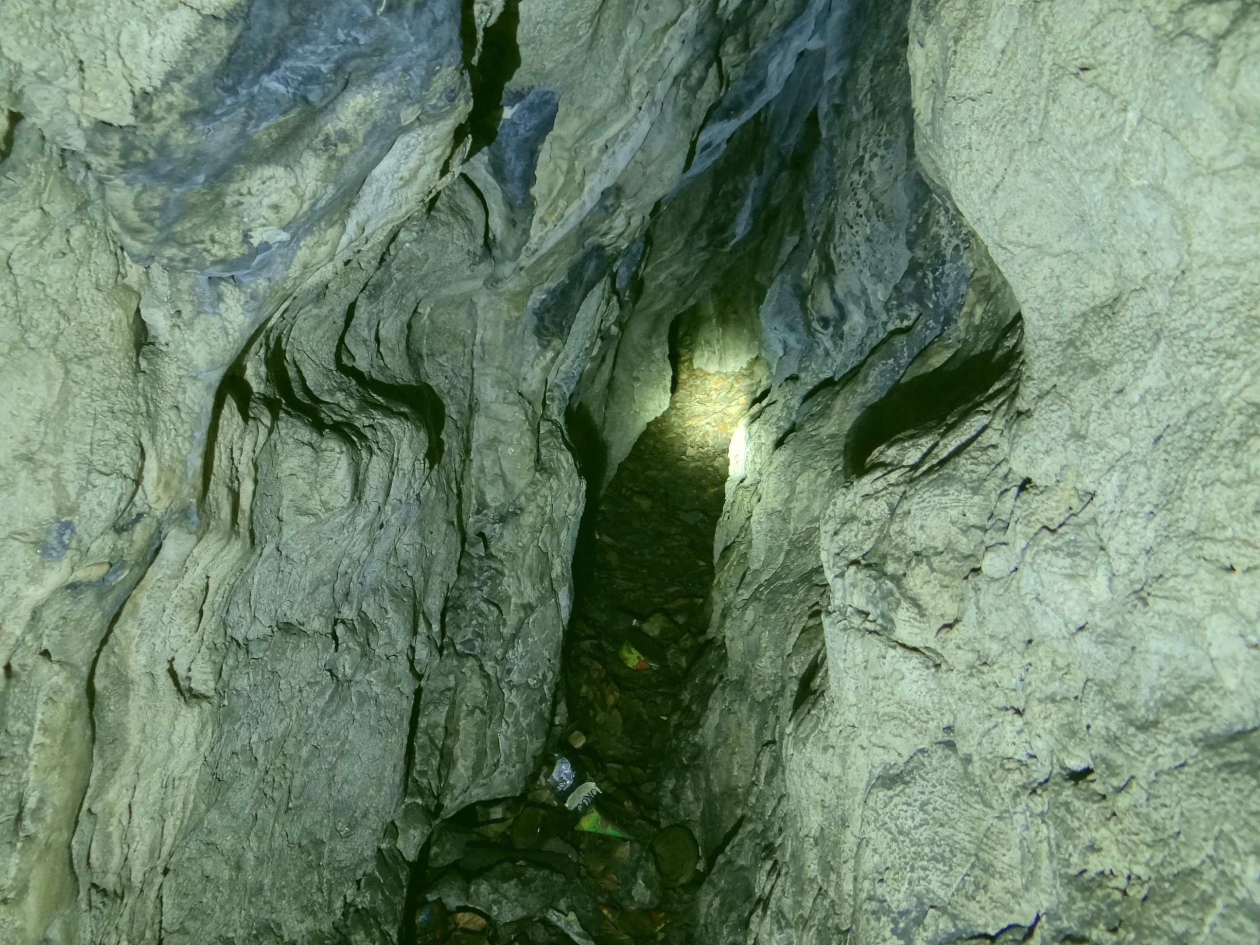 Jaskinia przy Kamyku (Jaskinia Pańskie Kąty) w Nielepicach